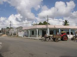 Foto del centro del poblado de Tamarindo en Florencia, Ciego de Ávila, Cuba